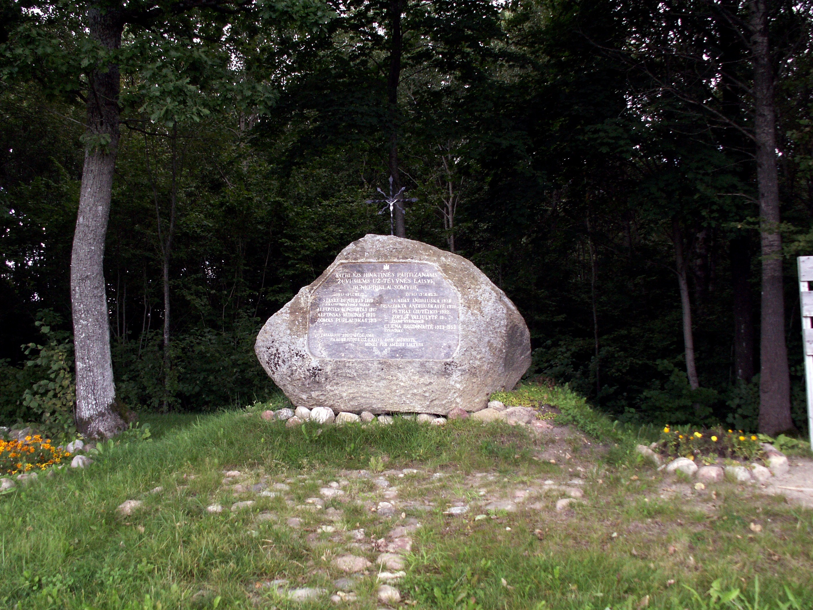 Smilgiai, Telšių rajonas, Lietuva